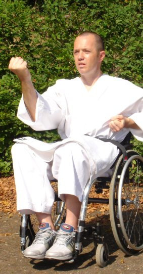 Handikarate, Wheelchair Karate, Undõ Goju-Ryu Karate-Do